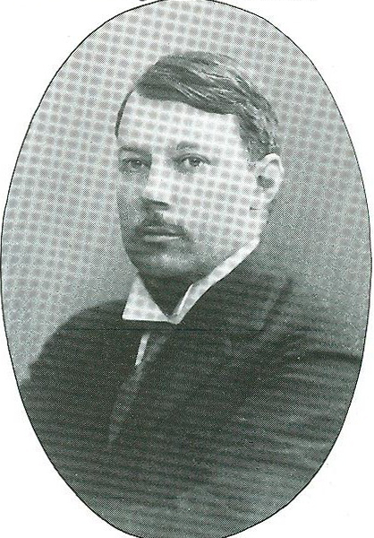 Yrjö Oskari Ruuth.